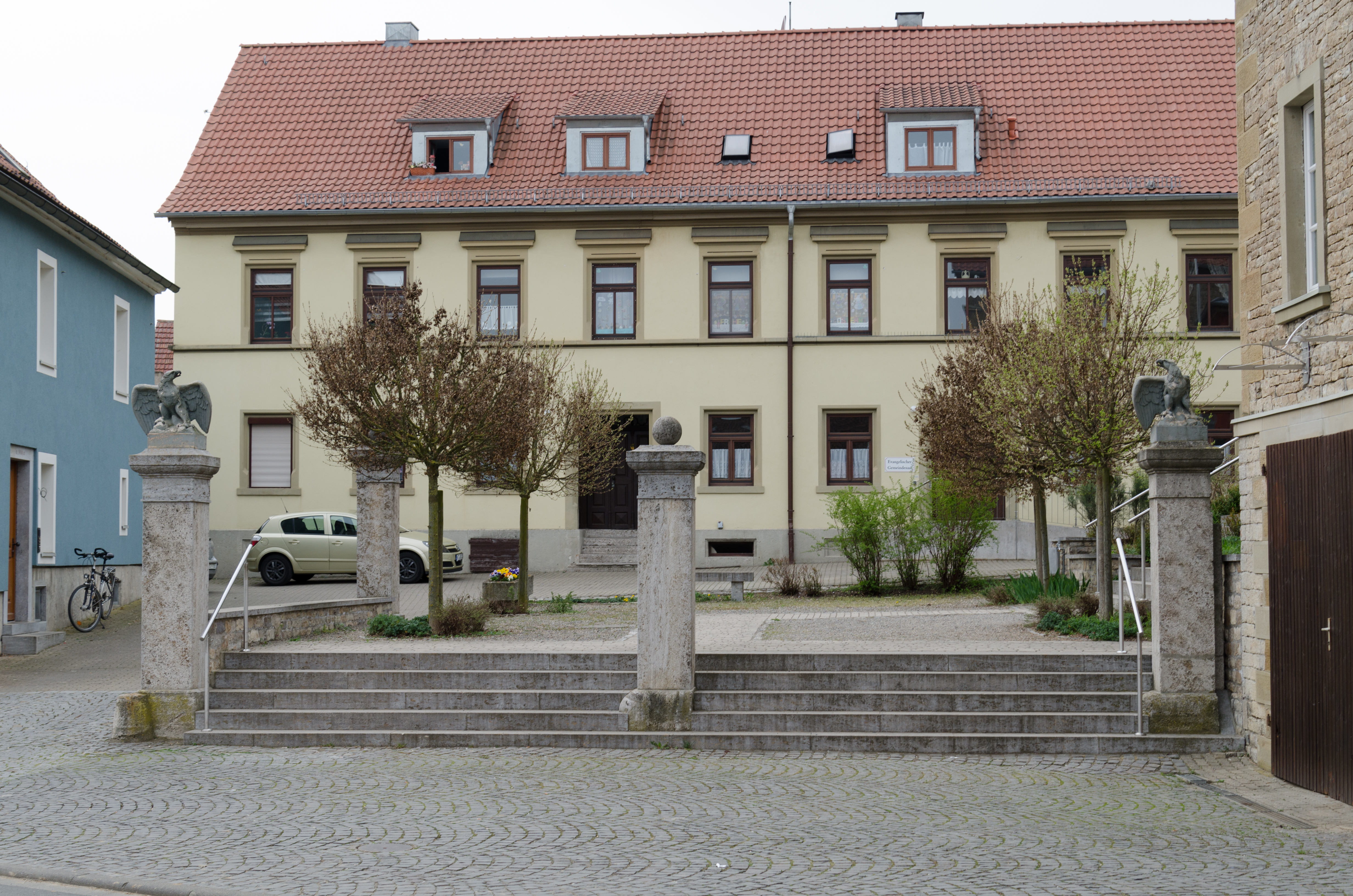 Buchbrunn, Hauptstraße 9, 11